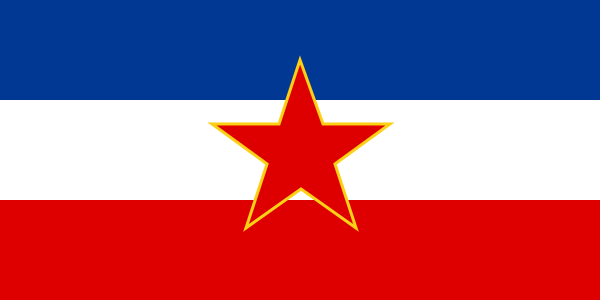 foto på flagga